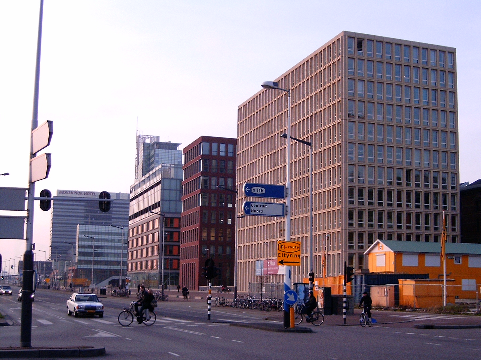 Nieuwe gebouwen in Amsterdam